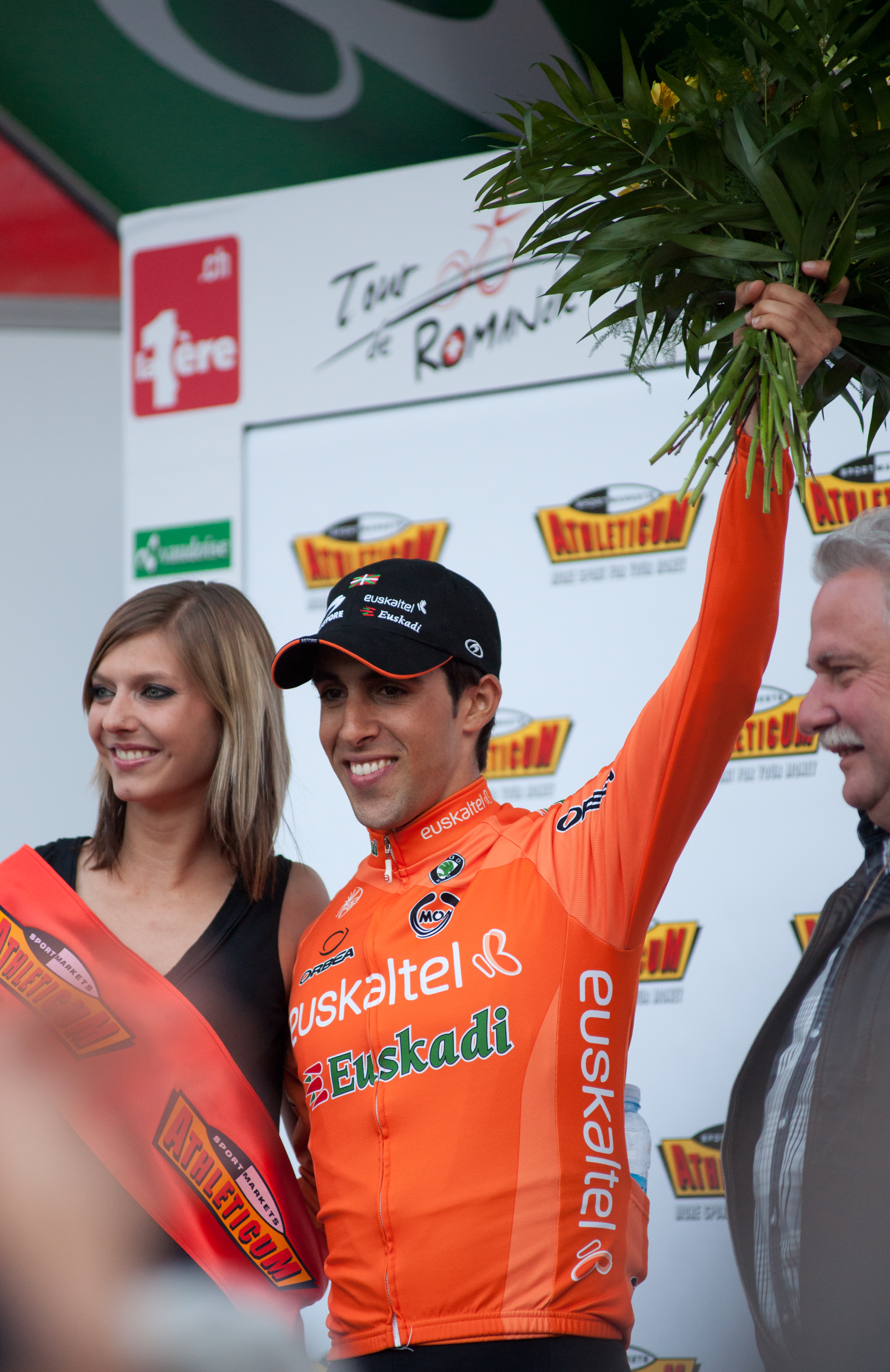 Contre la montre - Romandie 2011